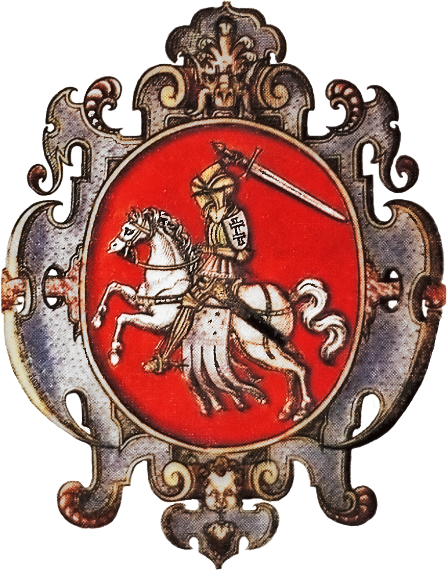 Беларуская (тарашкевіца): Герб Пагоня з рукапіснага гербоўніка Эразма Коміна (Erasmus Kamyn; 1575)